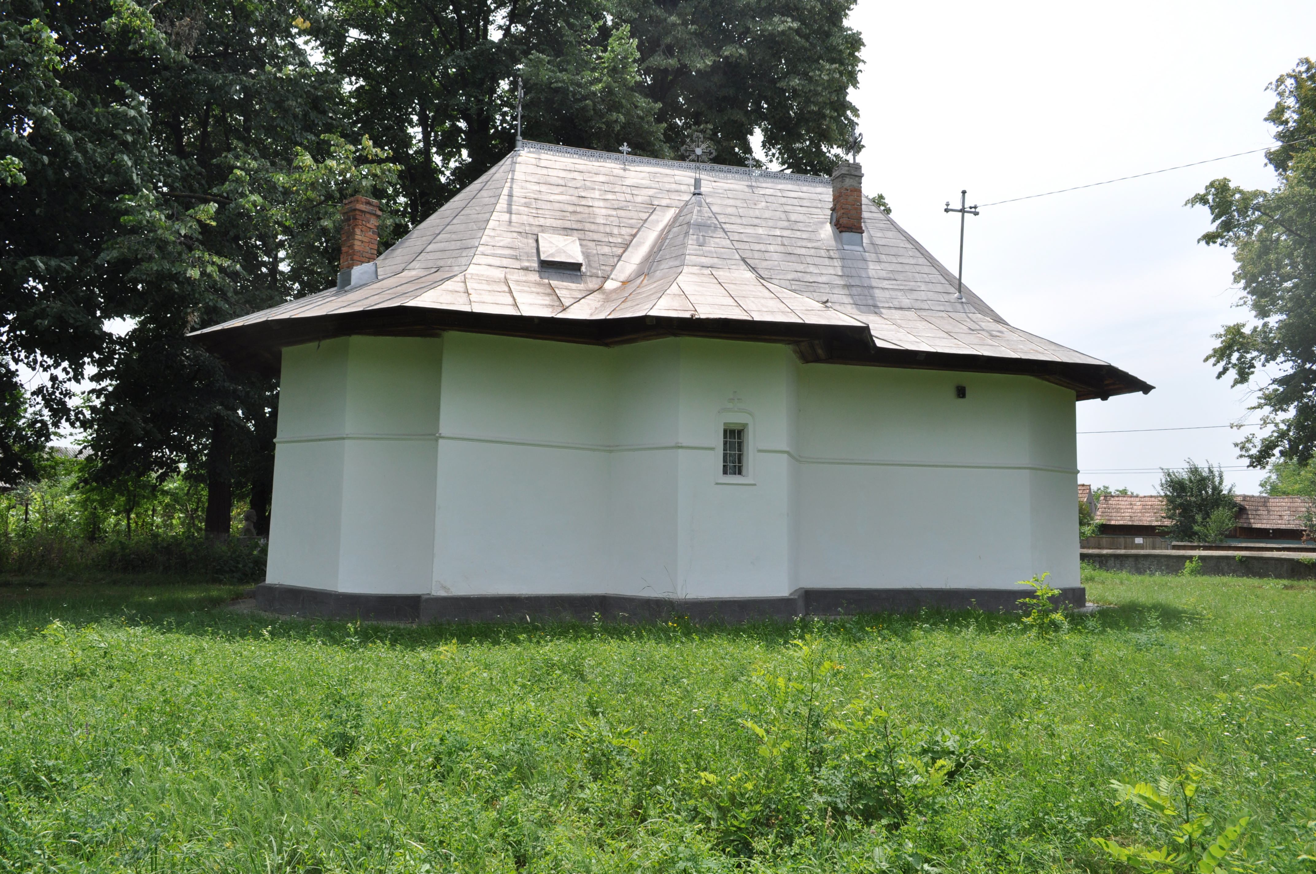 Gura Văii, Bacău